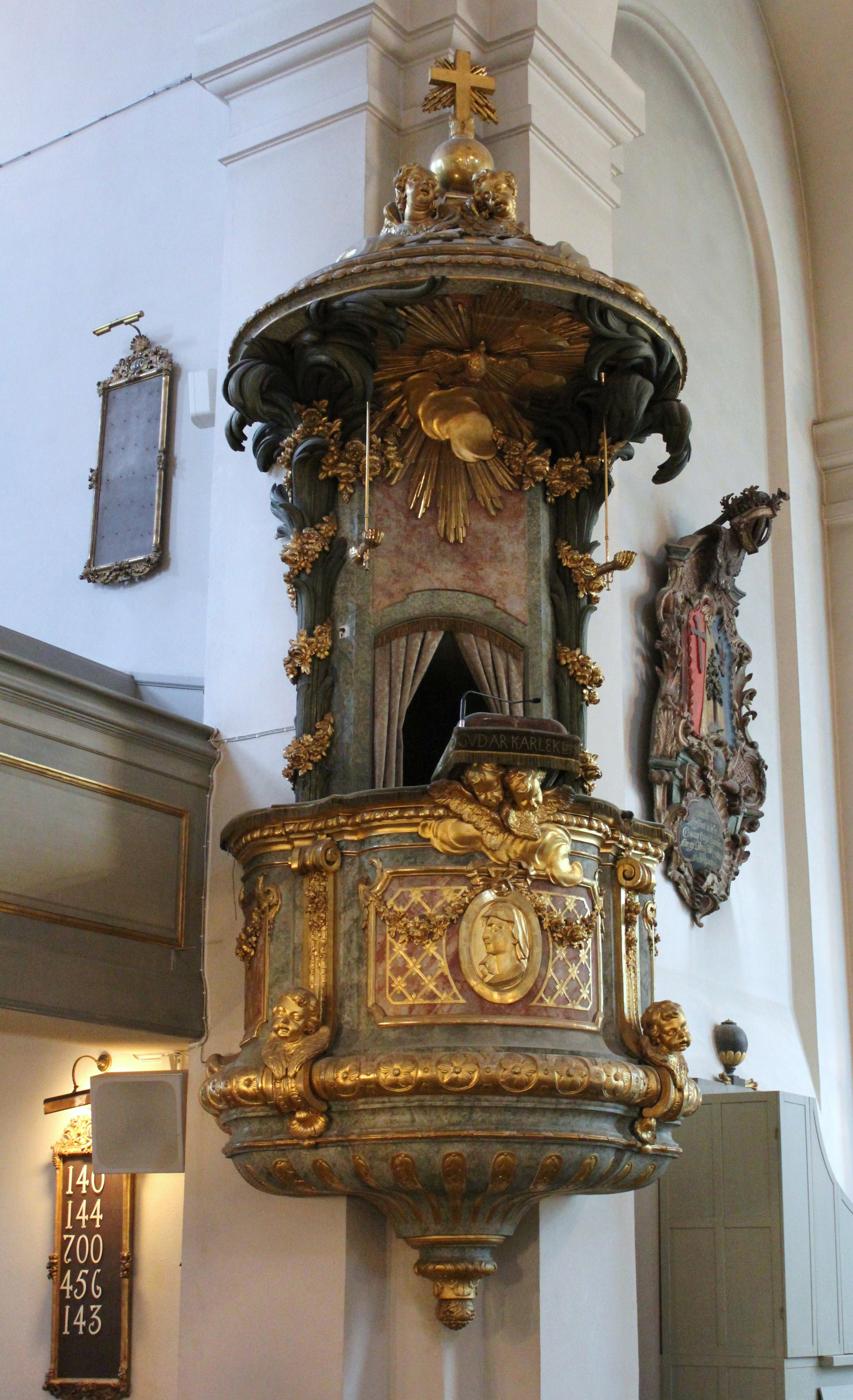 Maria Magdalena kyrka. Predikstol.